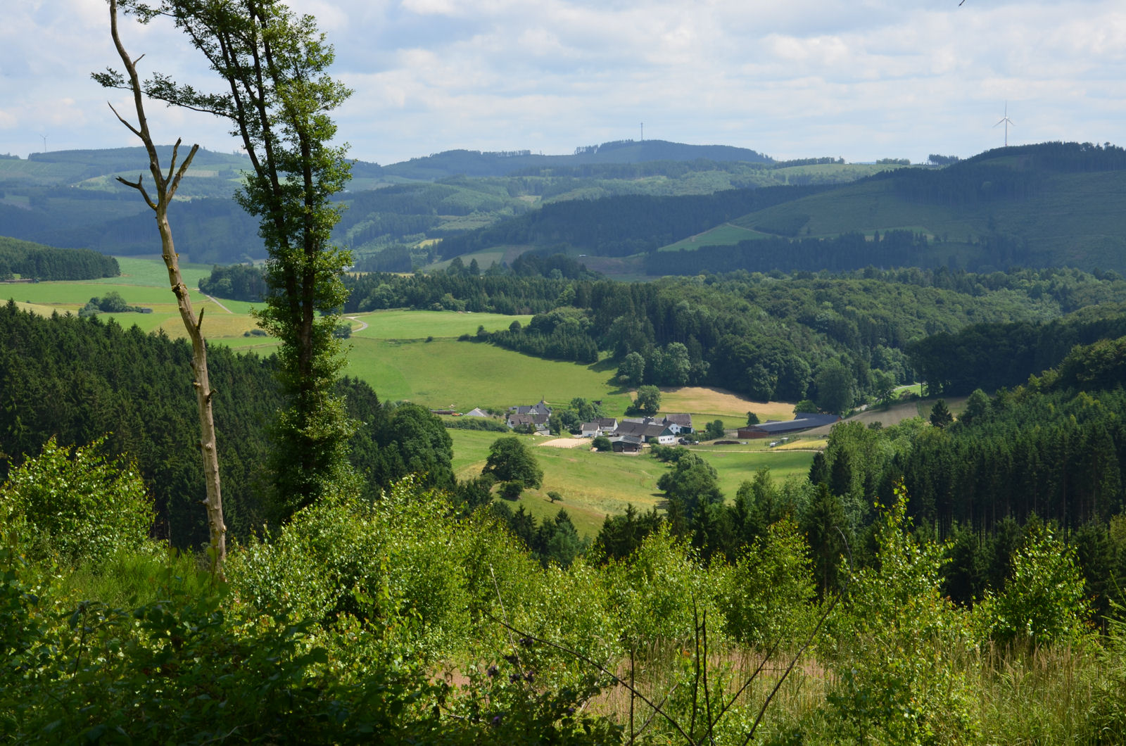 Hier sehen sie die schöne Naturlandschaft des Melbecketal. Auf den sehr guten Wanderwegen können sie herrliche Spaziergänge und Wanderungen unternehmen und dabei die schöne Naturlandschaft und Ruhe genießen.